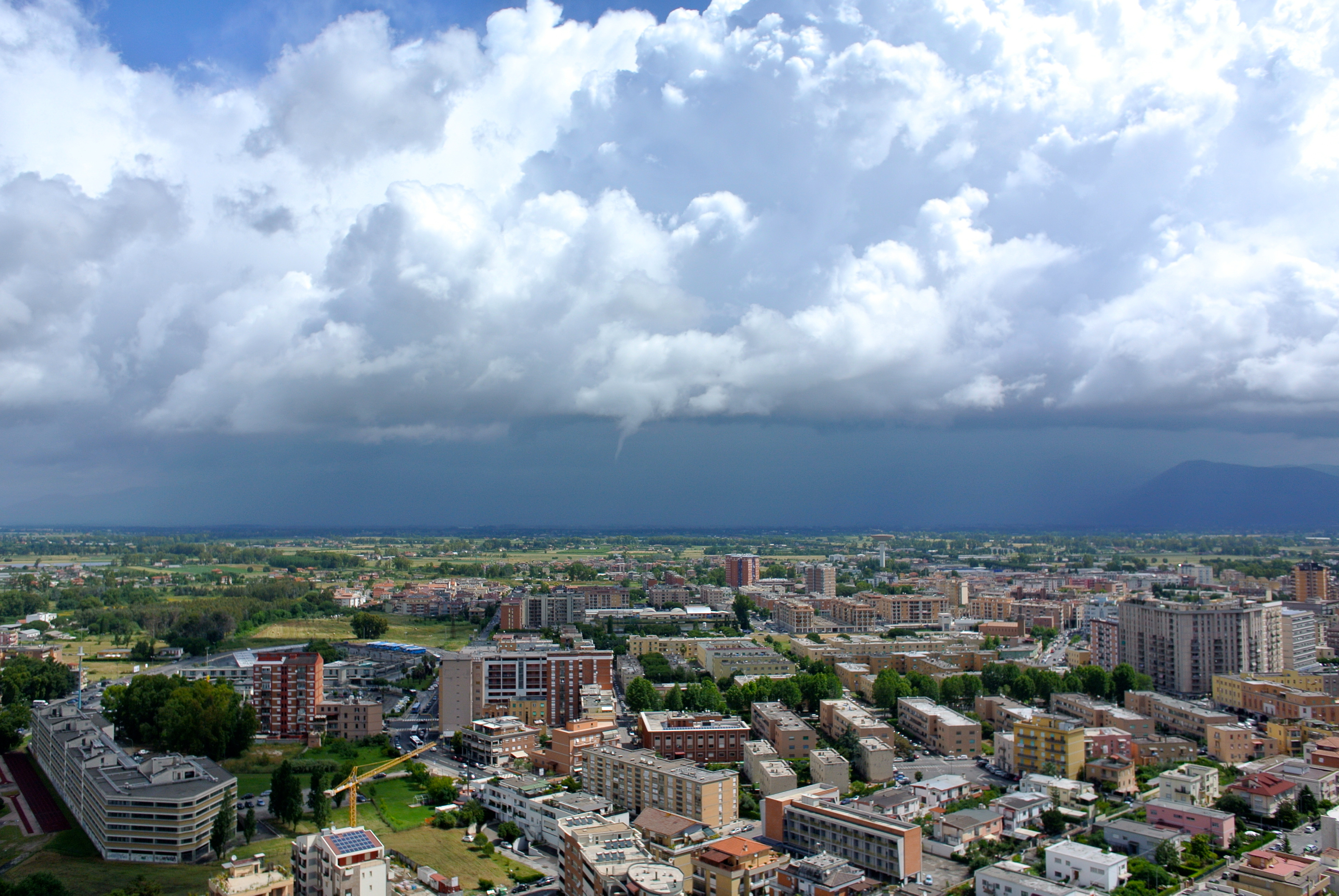 vista panoramica latina, Lazio, Italia